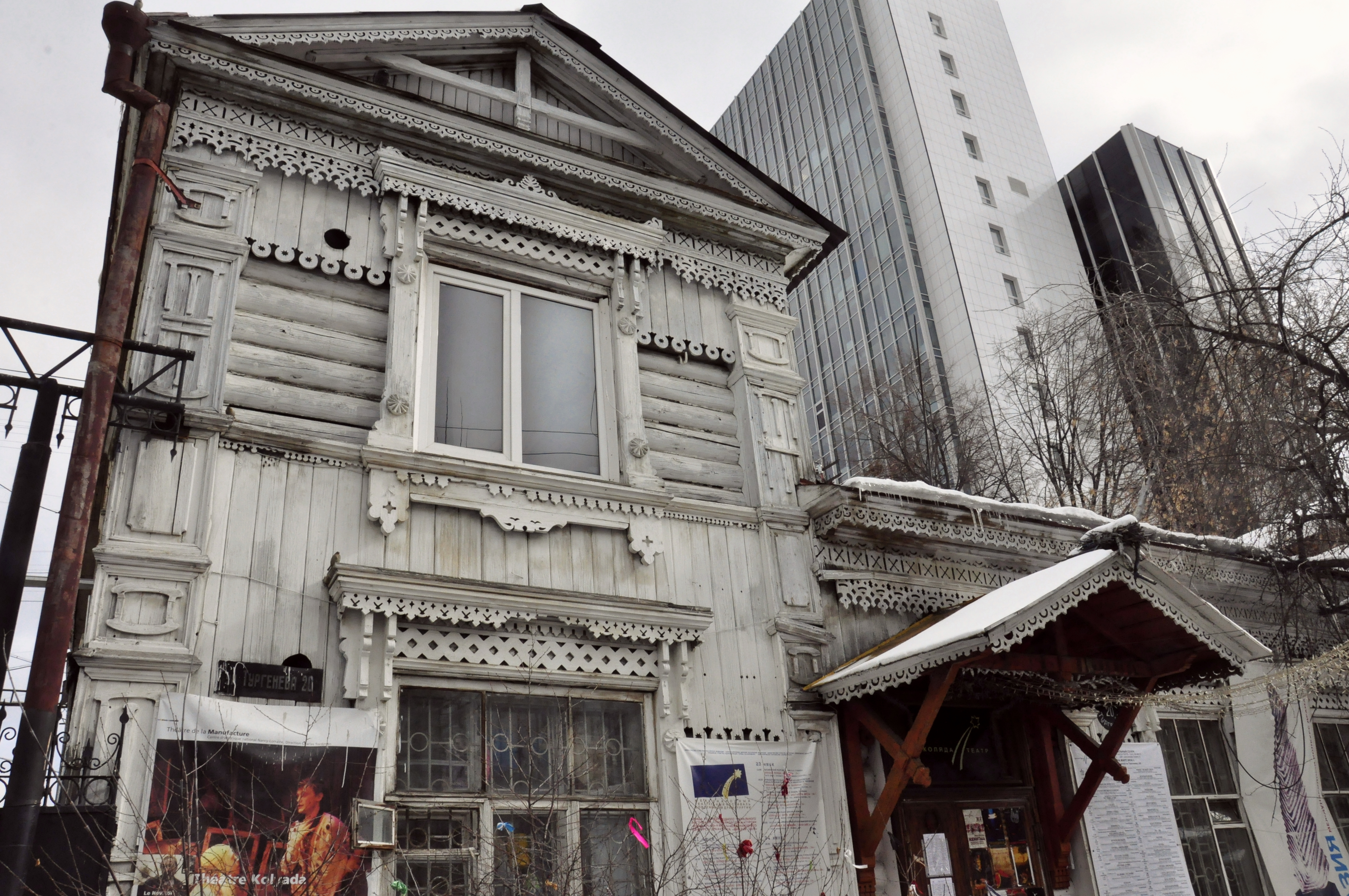 Театр Коляды ещё месяц будет в этом доме на Тургенева, 20